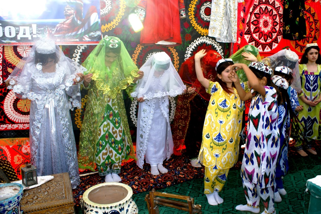 Свадебная церемония в Гиссарском районе Таджикистана,2011 год Тоҷикӣ: Маросими тӯйи никоҳ дар ноҳияи Ҳисори Тоҷикистон, соли 2011